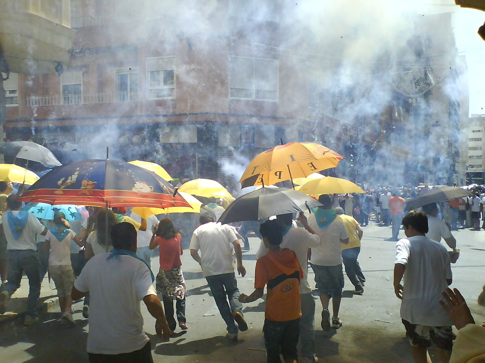 Acto de Correr la traca en Elda